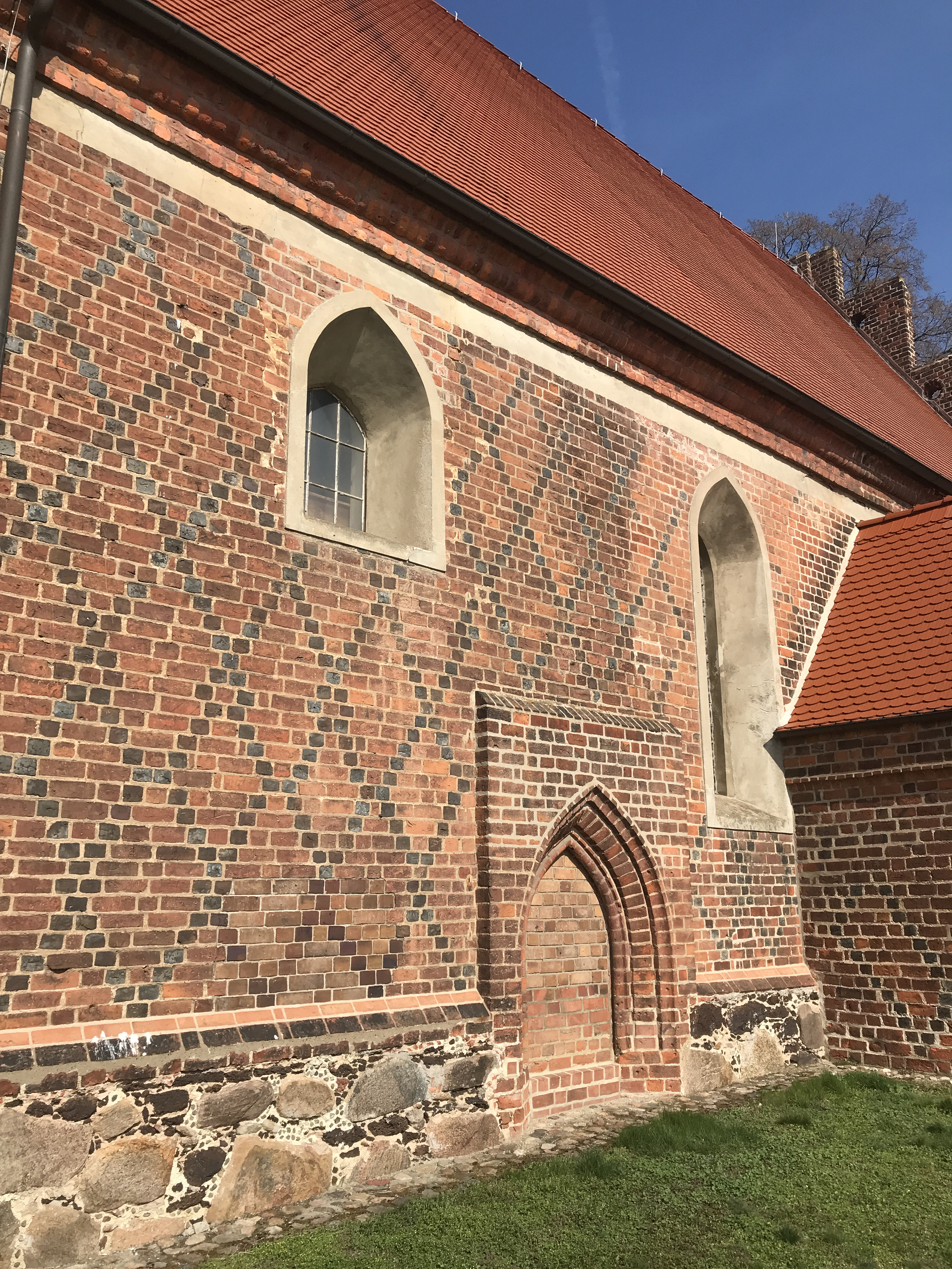 Dorfkirche Briesen (Burg/Spreewald) im Landkreis Dahme-Spreewald in Brandenburg